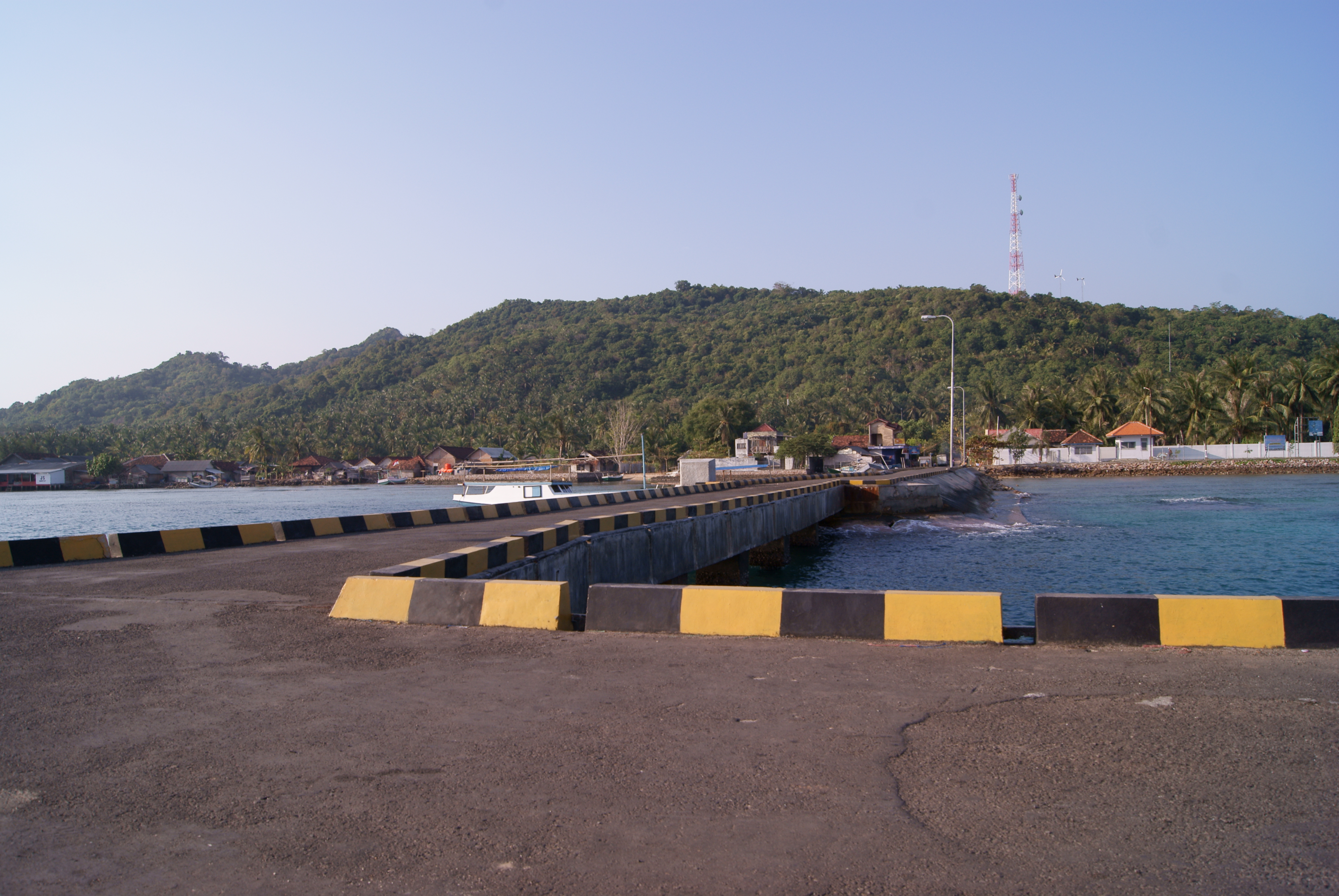 Pelabuhan Karimun Jawa, pemandangan dari pelabuhan baru.